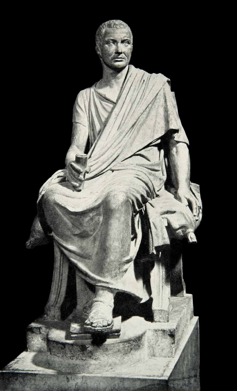 Statua di Marco Claudio Marcello - data della statua: Già di epoca Giustiniana